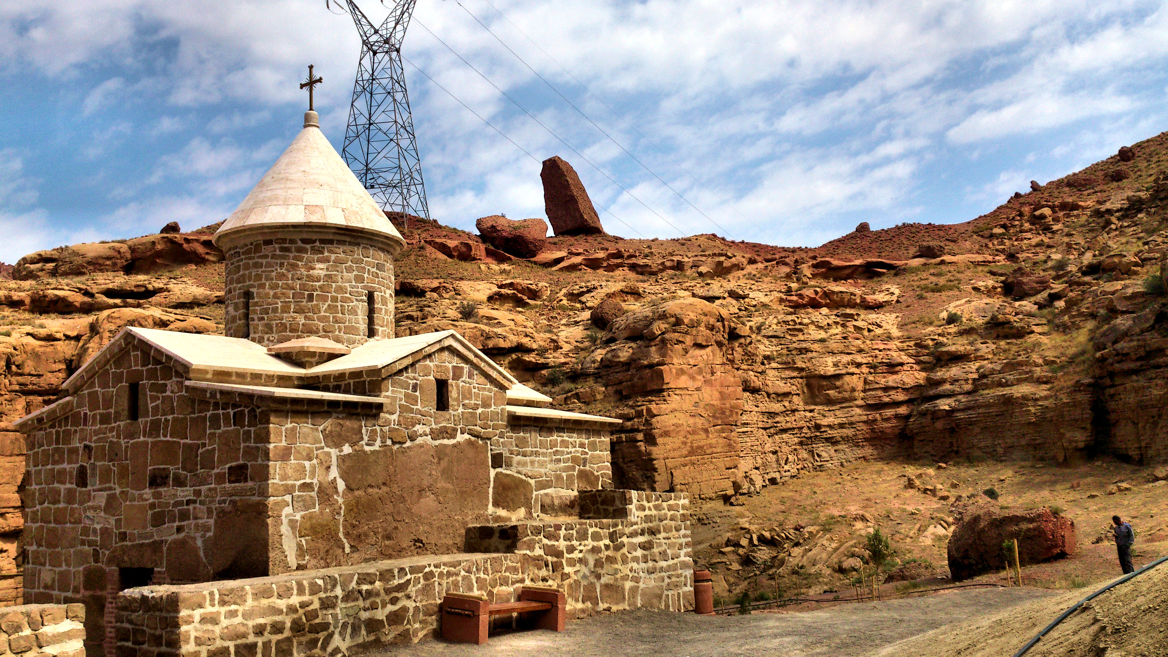 نماز خانه چوپان